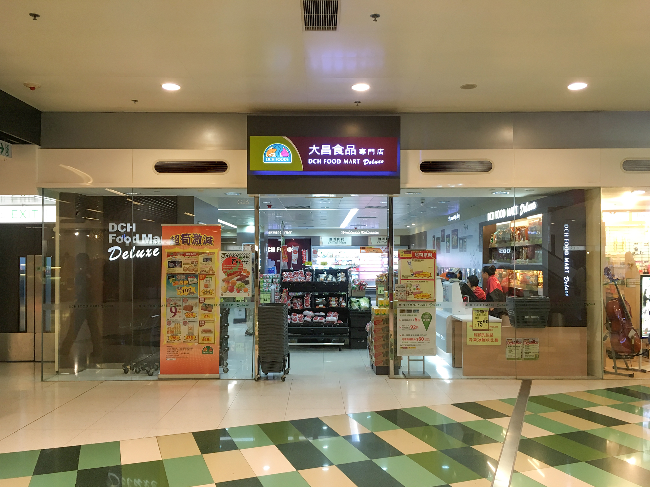 DCH Food Mart Deluxe